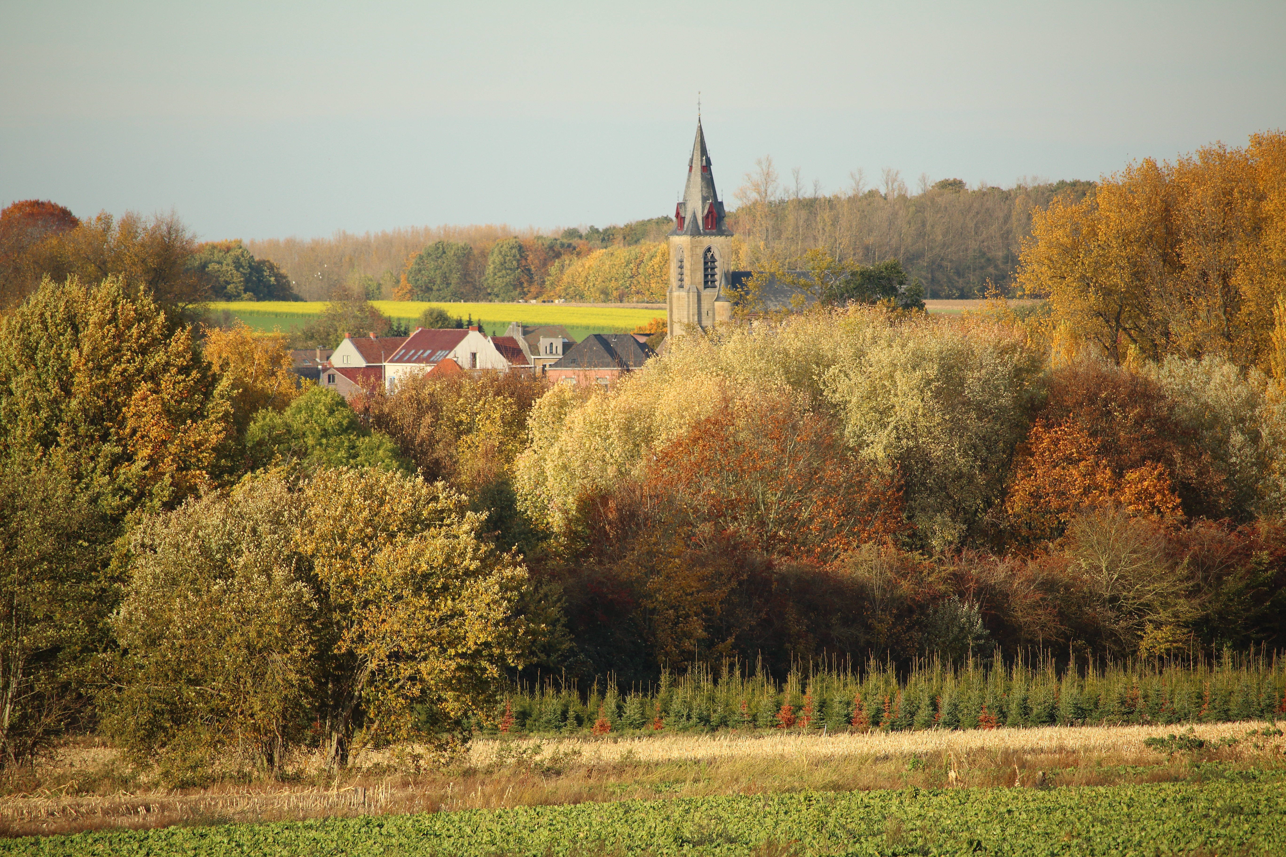 zicht op Hillegem, Herzele, Vlaanderen, België